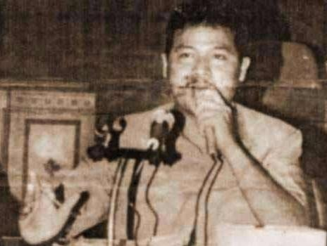 Agus Sutondo Ketua Panitia khusus RTRW Kota Depok